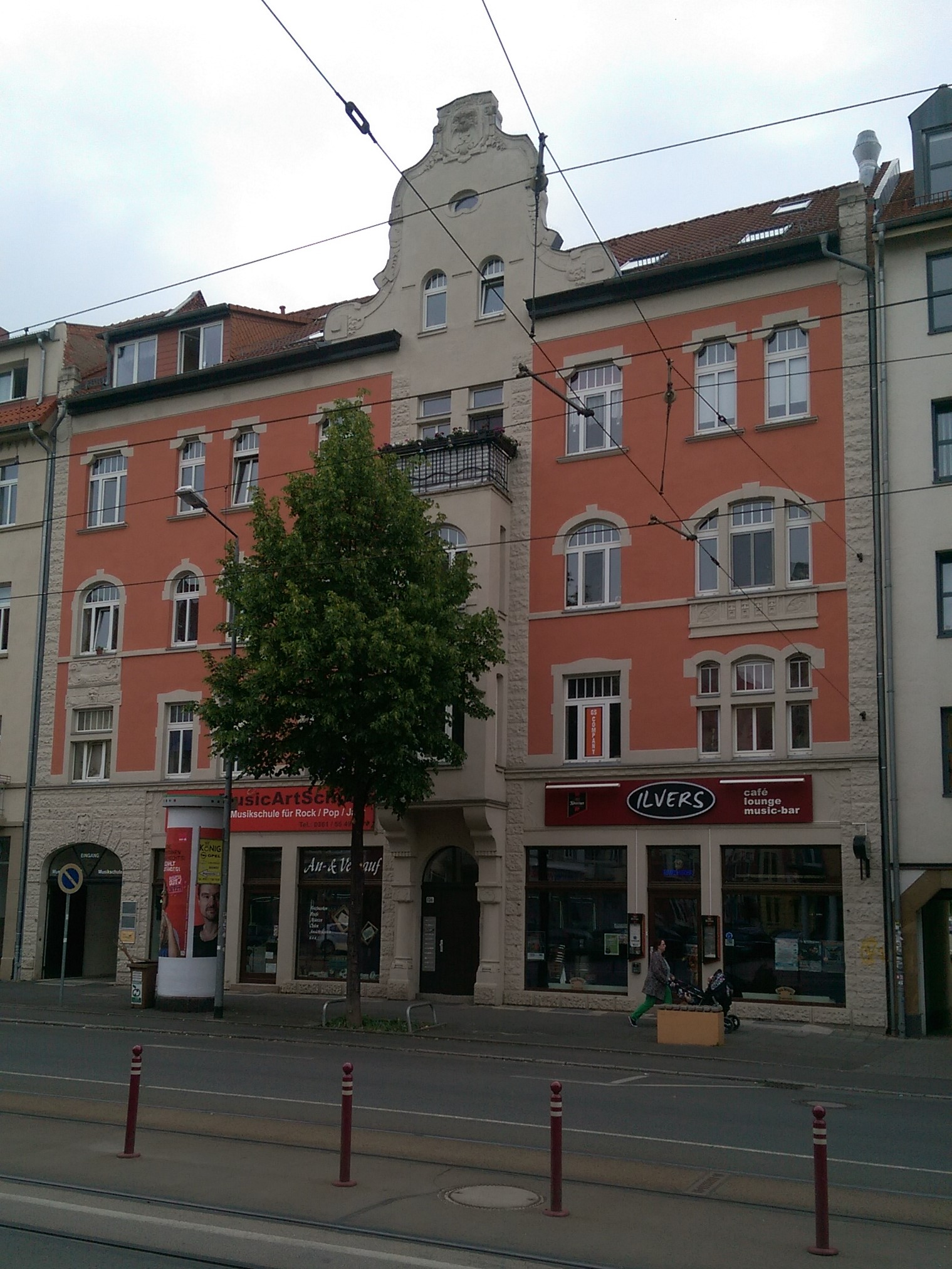 Magdeburger Allee 136 in Erfurt